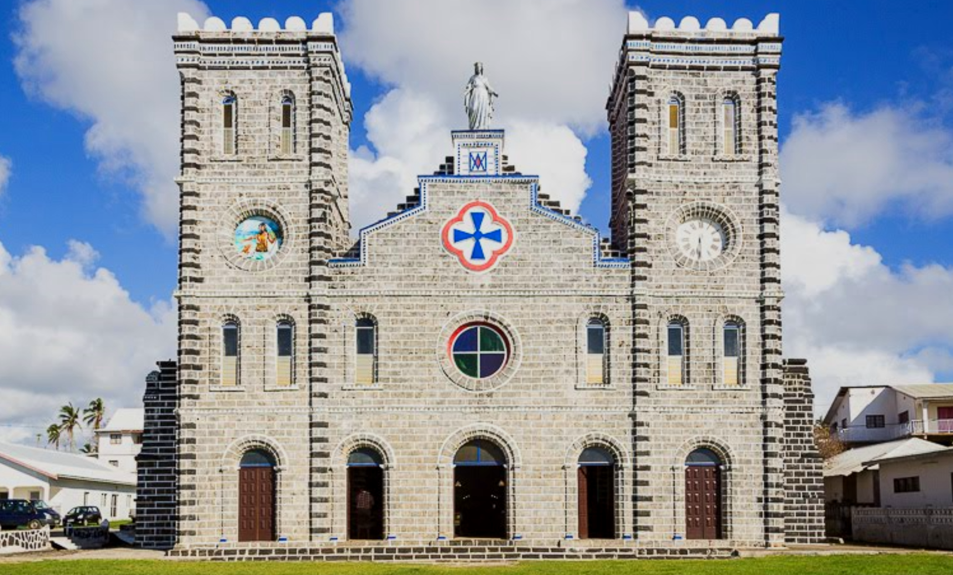 Ein Bild der Kathedrale in Mata-Utu